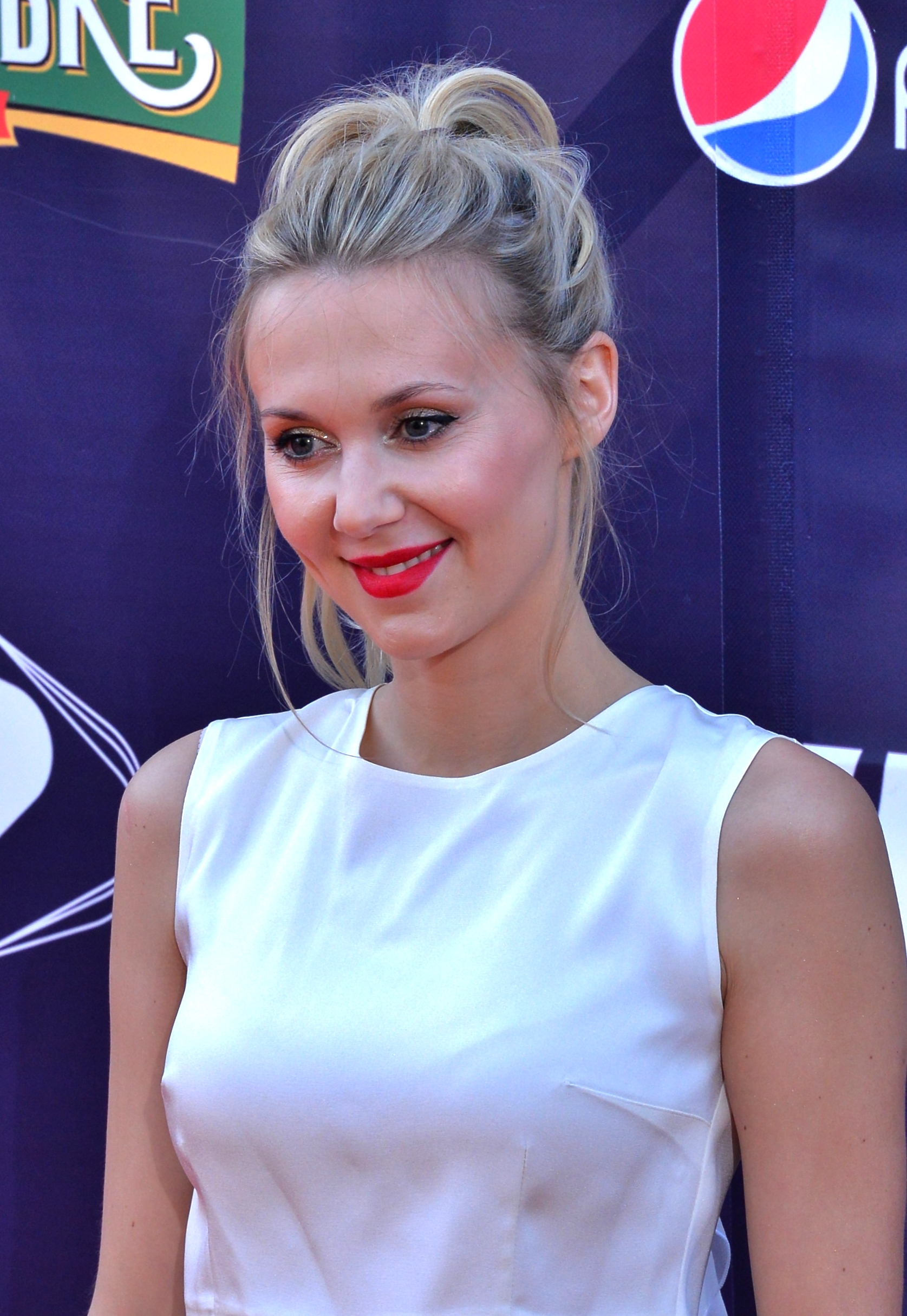 Польська співачка Кася Мось на церемонії відкриття пісенного конкурсу Євробачення 2017 у Києві